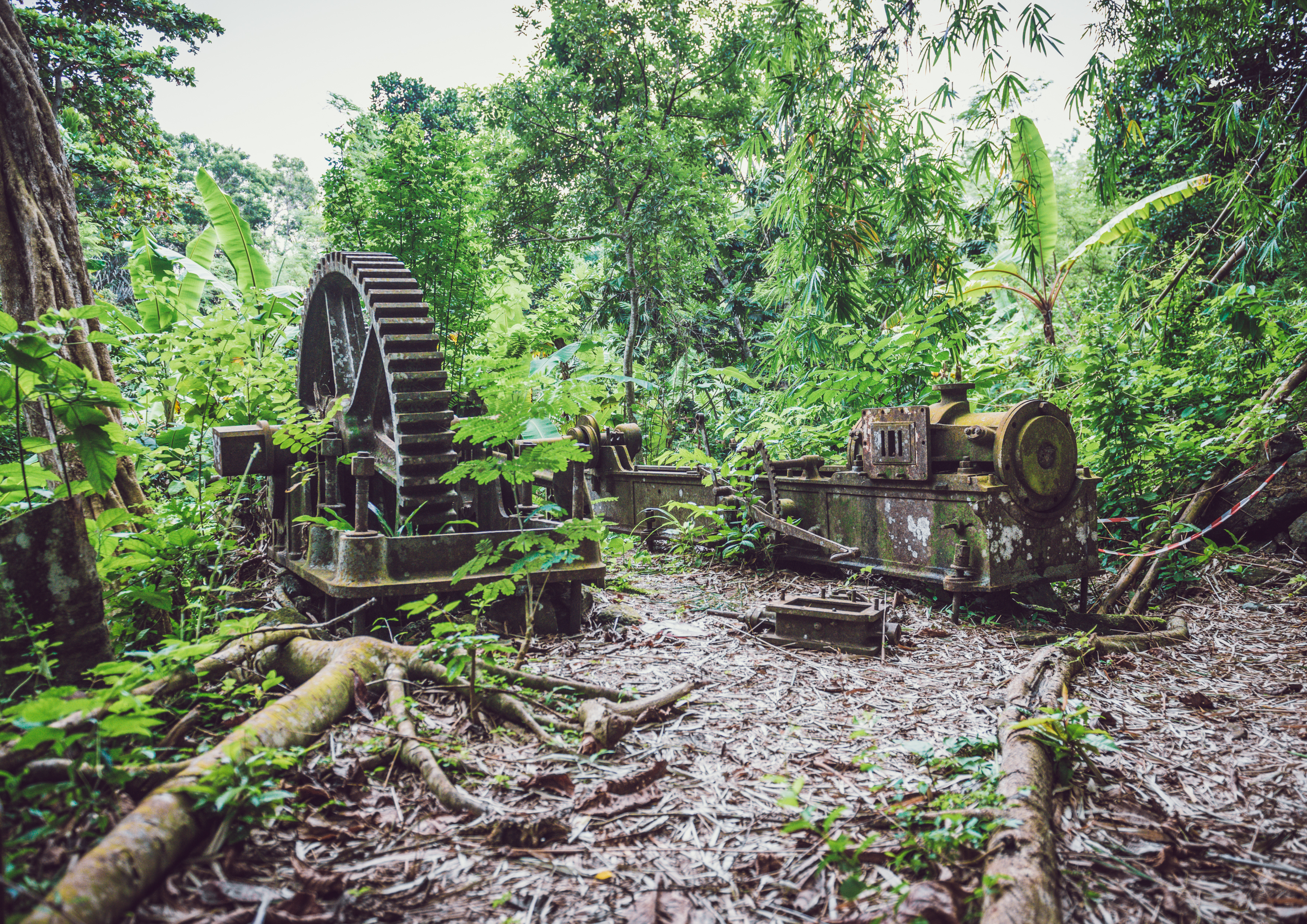 Vestiges de l'usine sucriere de Soulou Mayotte